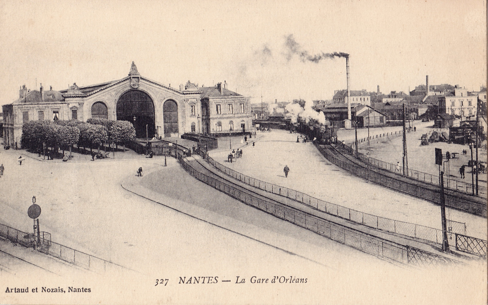 Carte postale ancienne éditée par Artaud et Nozais à Nantes : NANTES - La Gare d'Orléans